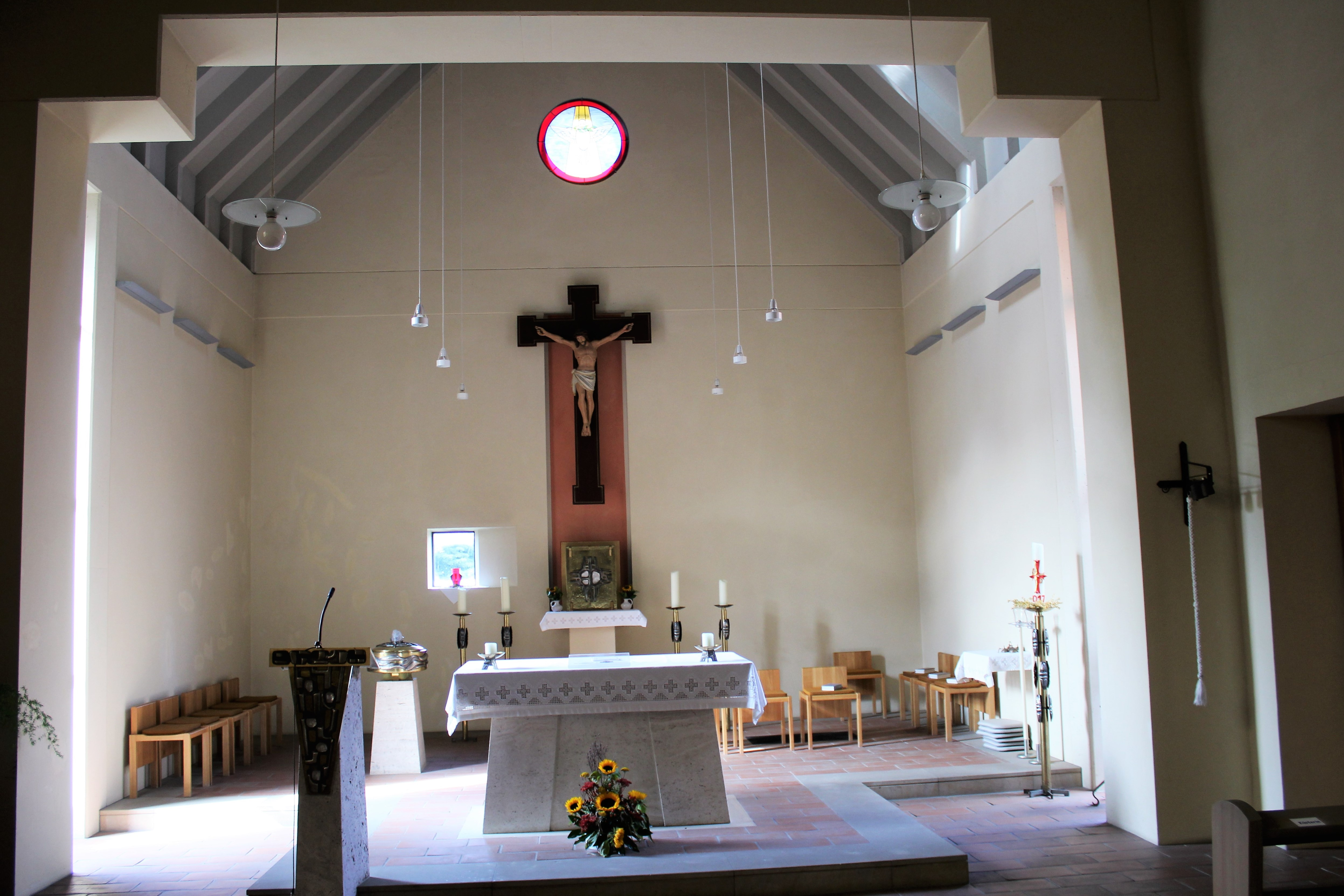 Katholische Kirche St. Joseph in Weener, Landkreis Leer, Ostfriesland, Deutschland